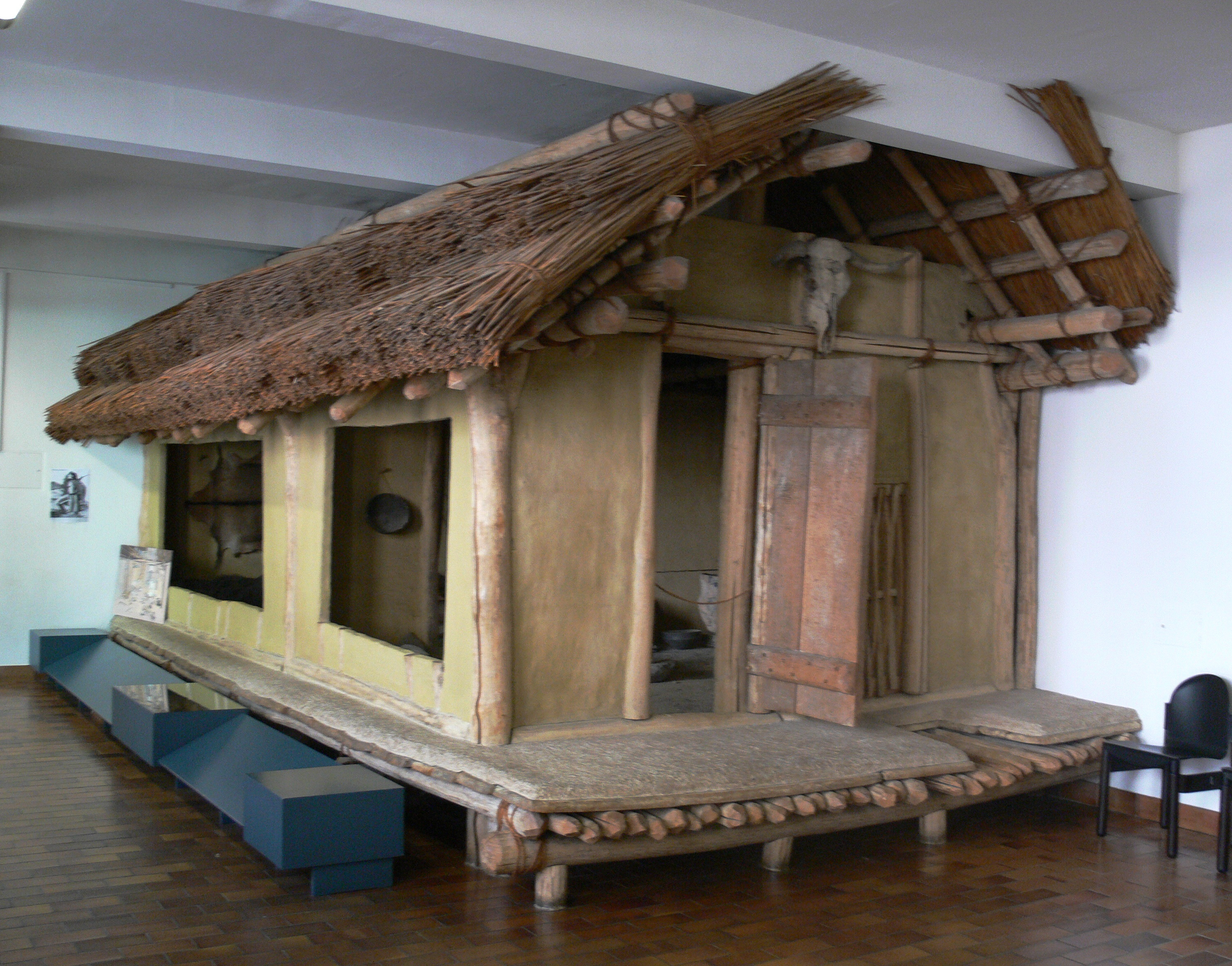 Schaffhausen, Museum zu Allerheiligen, Dauerausstellung zur regionalen Archäologie (vor der Neuaufstellung) Rekonstruktion eines bronzezeitlichen Pfahlbaus, Außenansicht